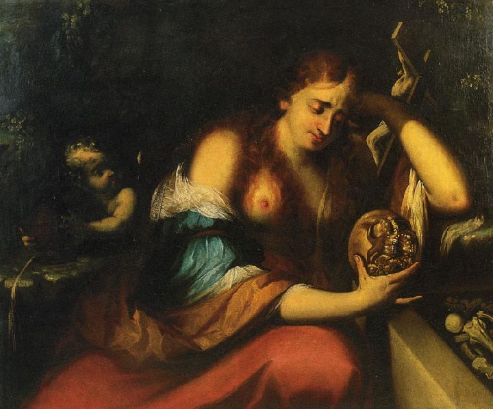 Pedro Camacho Felizes, La Magdalena, Lorca, Casa de Guevara.